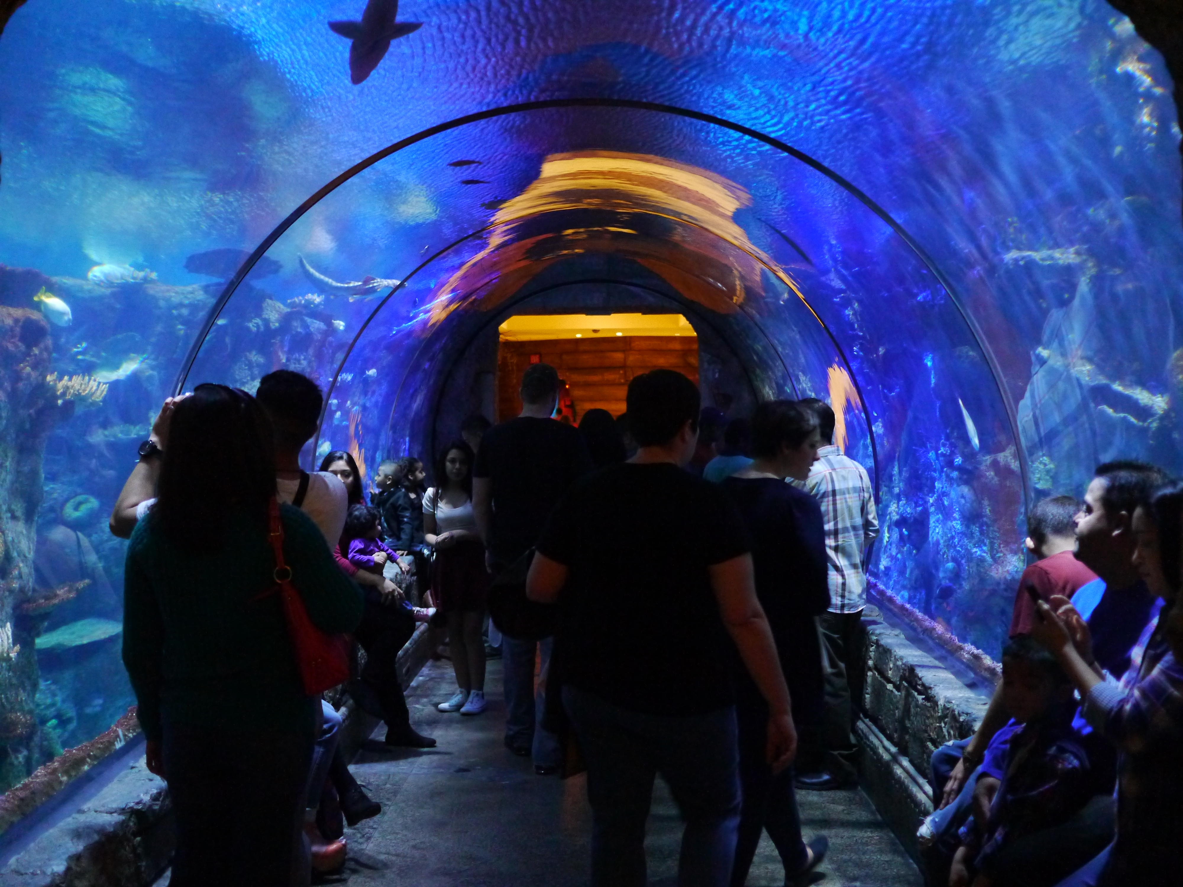 Shark Reef Aquarium at Mandalay Bay